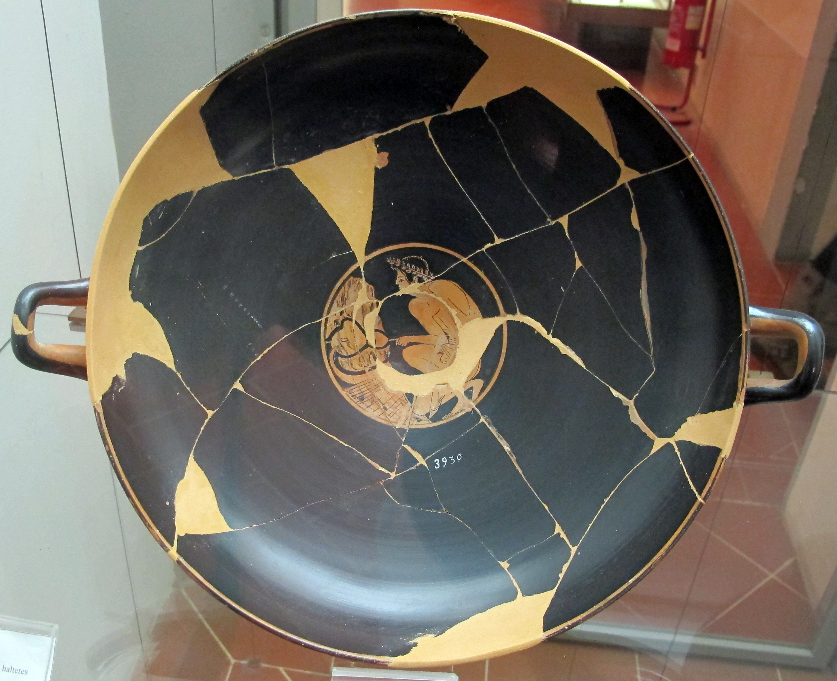 Museo archeologico di Firenze